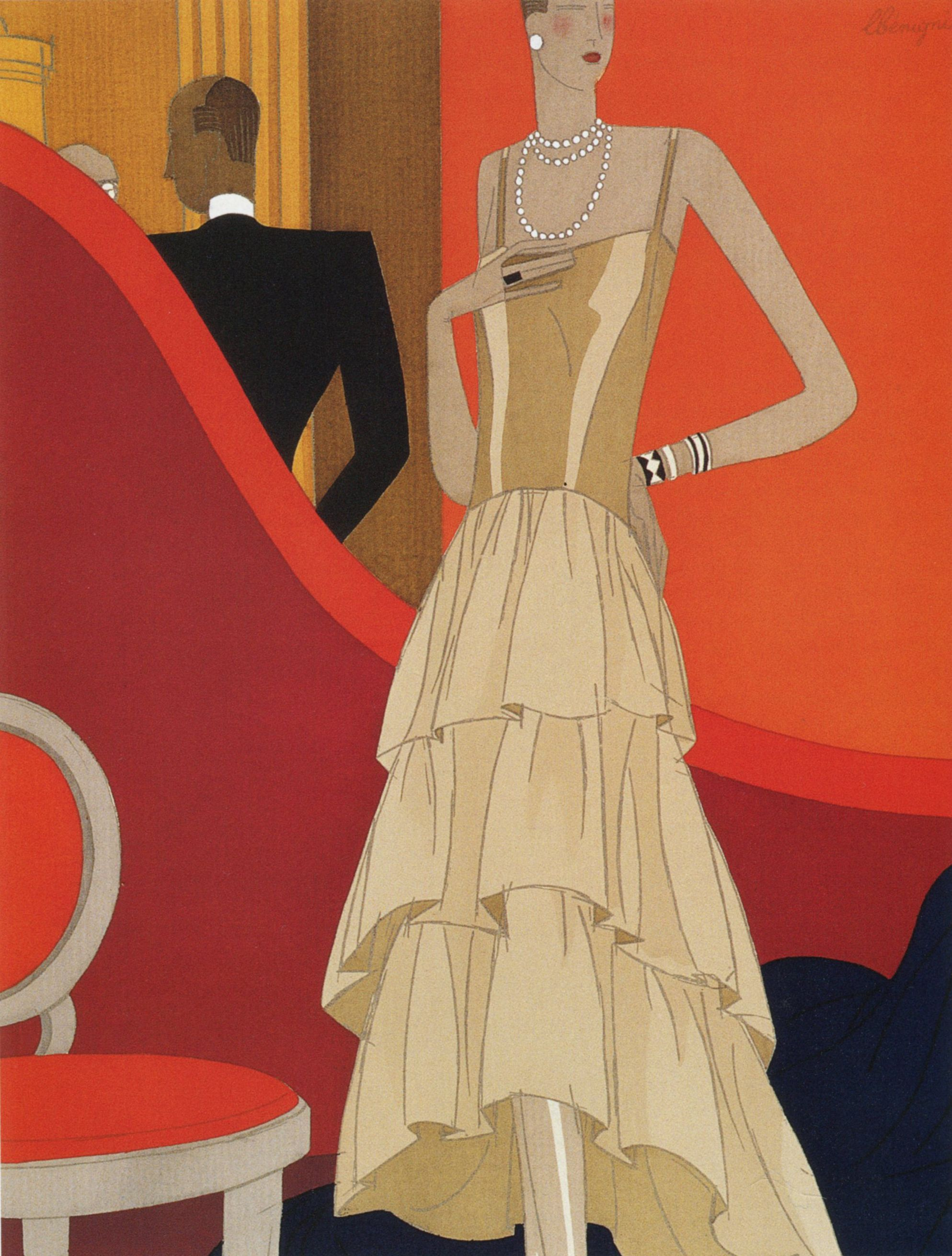 Von Léon Bénigni (1892-1948) um das Jahr 1929 geschaffenen Plakates als Teil einer vom Stil des Art Deco beeinflussten Collection von Mode-Illustrationen für die von dem französischen Industriellen und Politiker Jean Prouvost geführte Spinnerei Filatures Prouvost Masurel et Cie ...